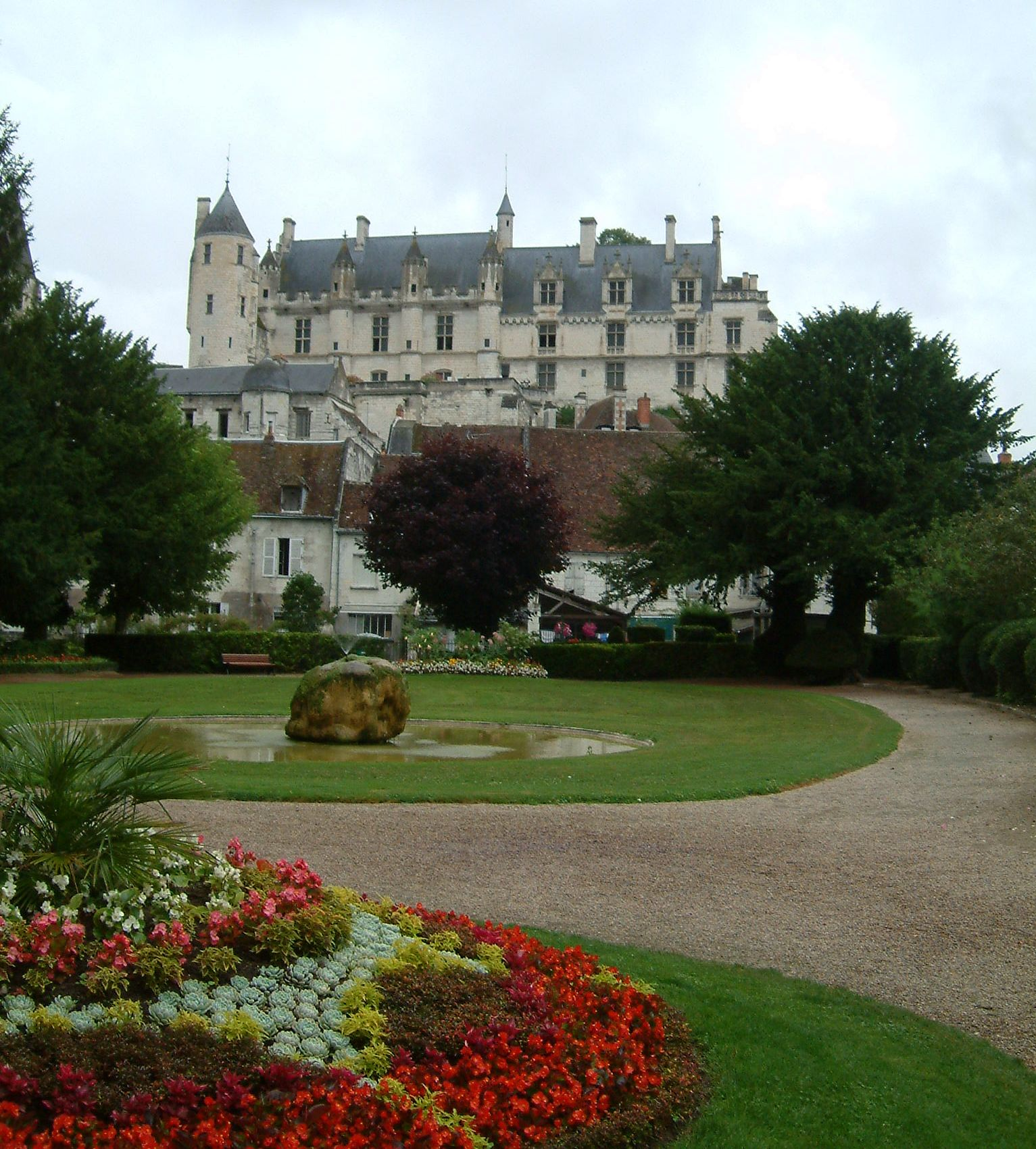 Château de Loches, Loches, FRANCE